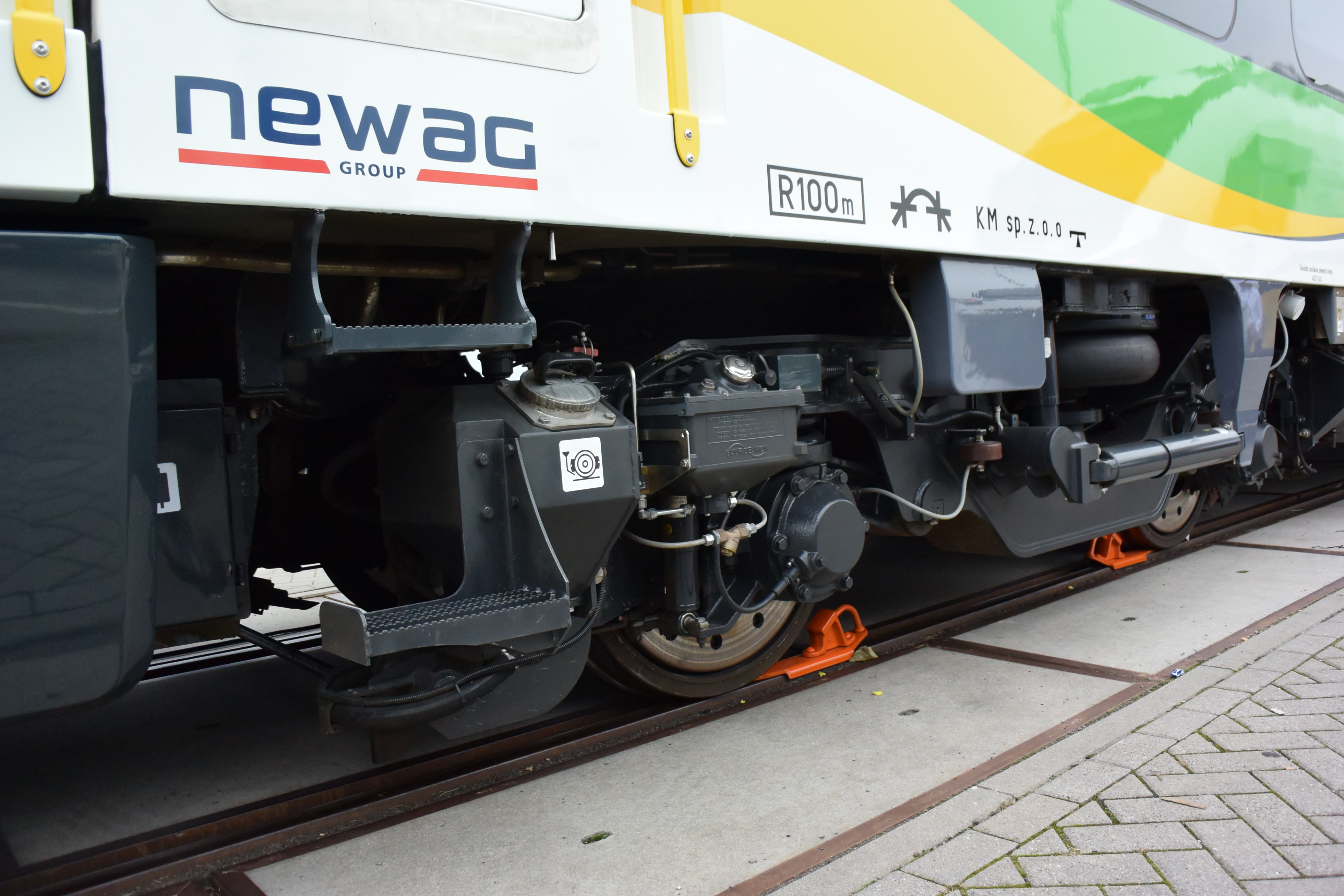 Wózek Newag 222M podczas InnoTrans 2014